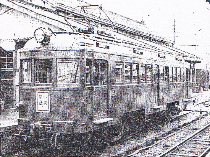 名鉄モ600形電車（初代）。旧・名古屋鉄道1500形として1925年新製。名鉄岩倉支線岩倉駅にて撮影。